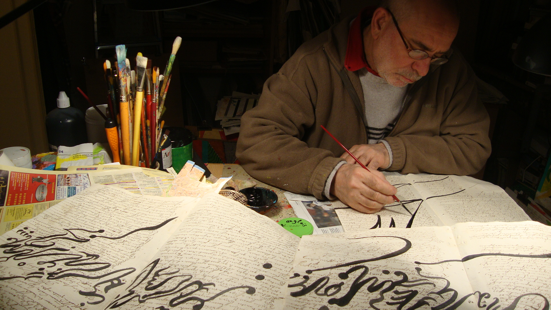 José San Martin (né en 1951)